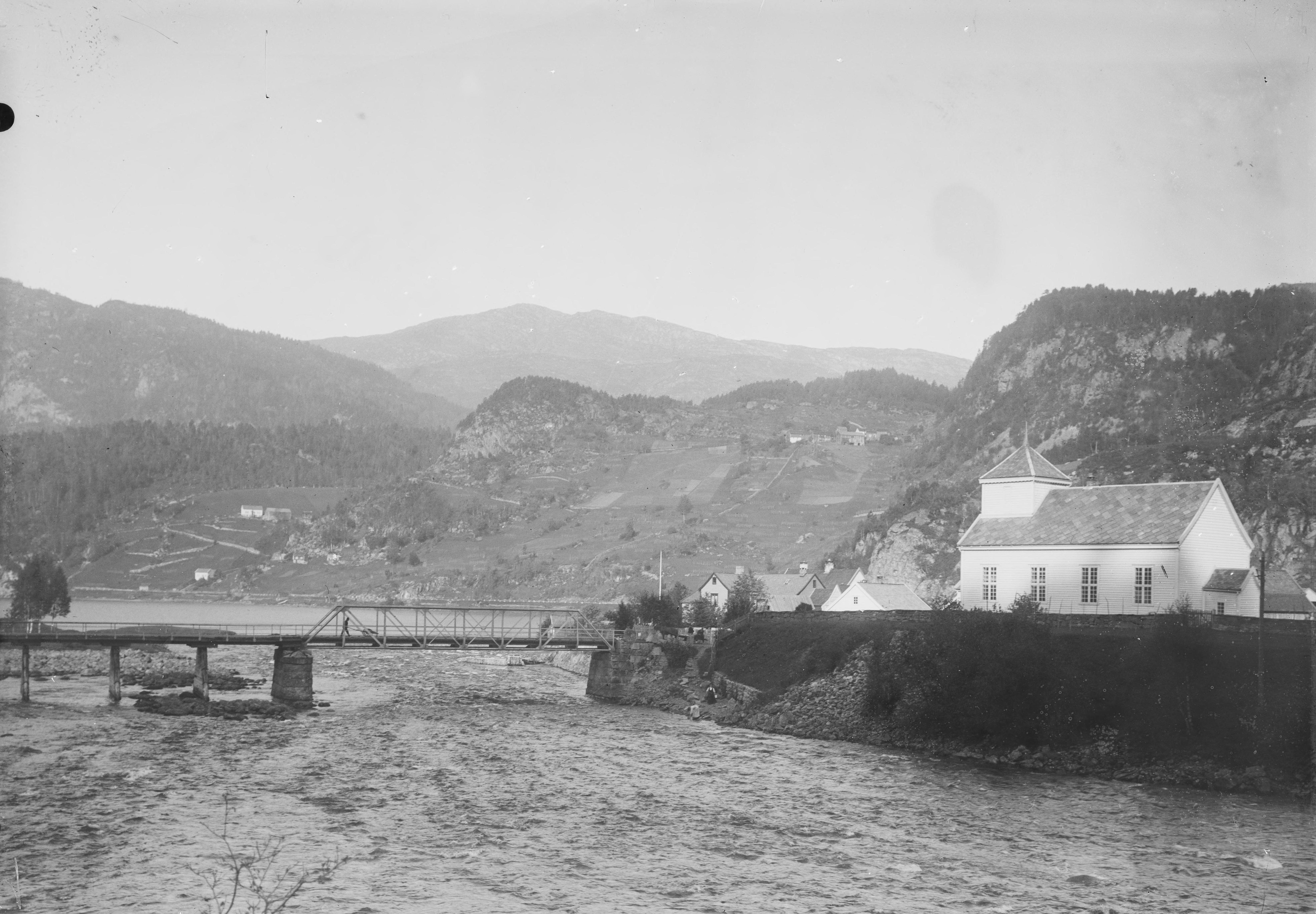 Bildet er hentet fra Nasjonalbibliotekets bildesamling. Anmerkninger til bildet var: Påskrift arkivark: Evanger kirke, Fossetangen Arkivnummer: 4815b, 138 Evanger, Voss, Hordaland